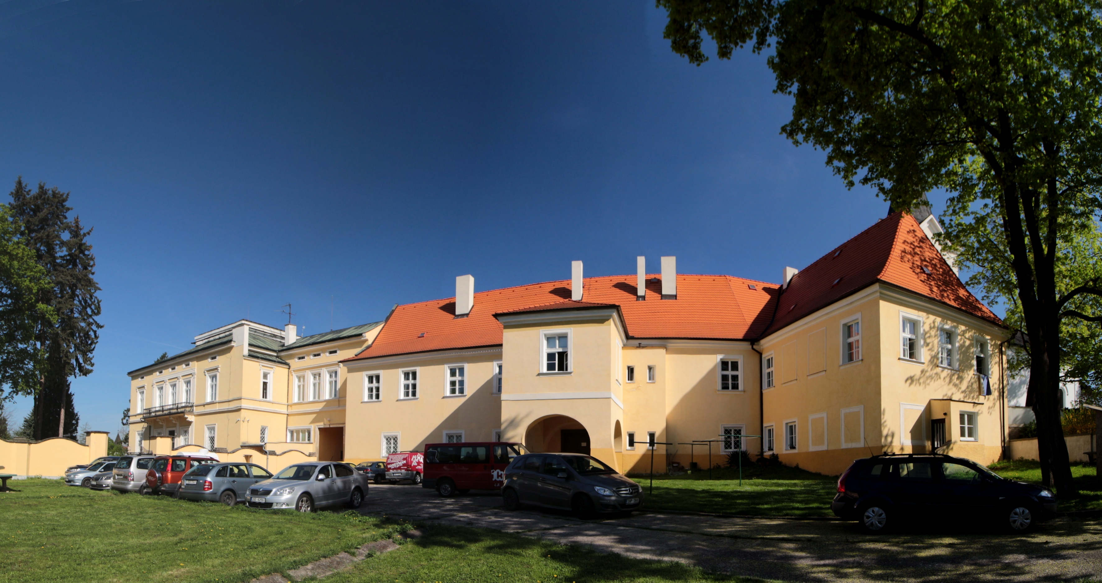 Praha-Dolní Počernice, jižní strana zámku